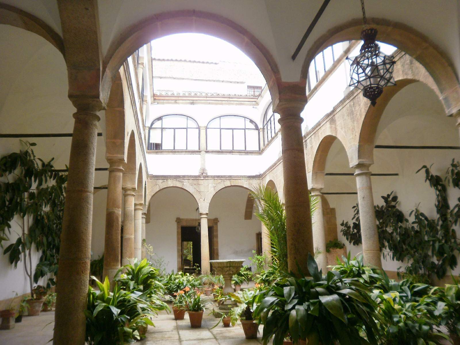 Casa de los Ovando (Cáceres)